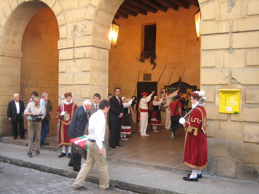 Homenaje a Candido Saseta en el ayuntamiento de Hnodarribia (abril de 2008) tras el hallazgo de sus restos en Asturias. Sus restos mortales están en el arcón que portan hacia el interior del ayuntamiento.